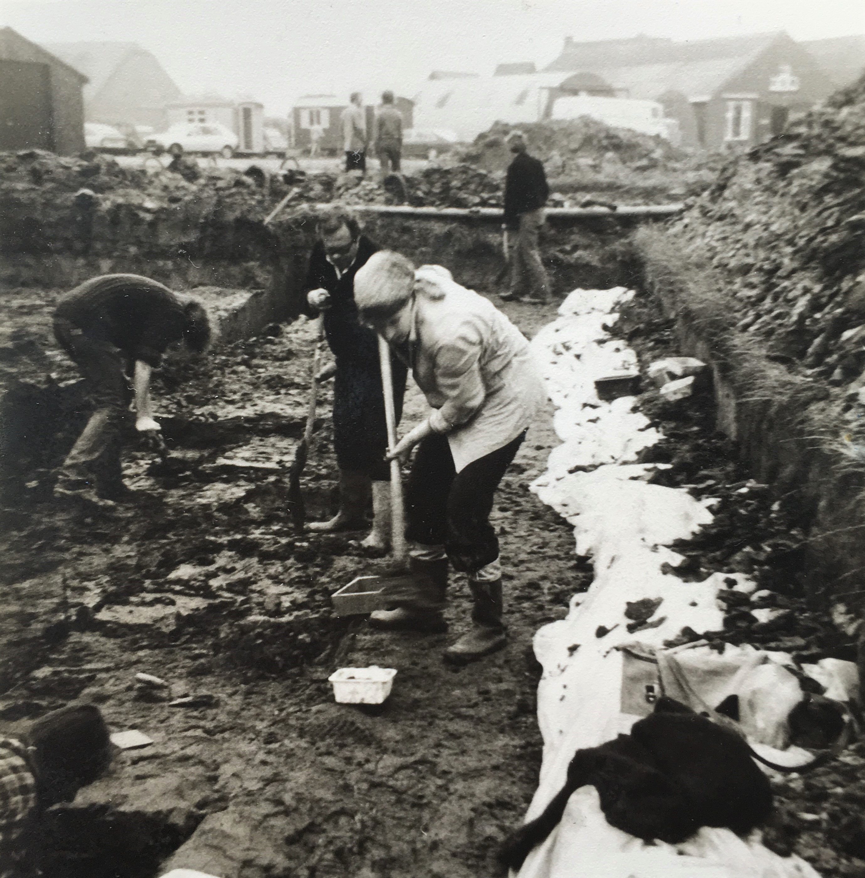 Opgraving Vriesland-Hekelingen - gravers aan het werk